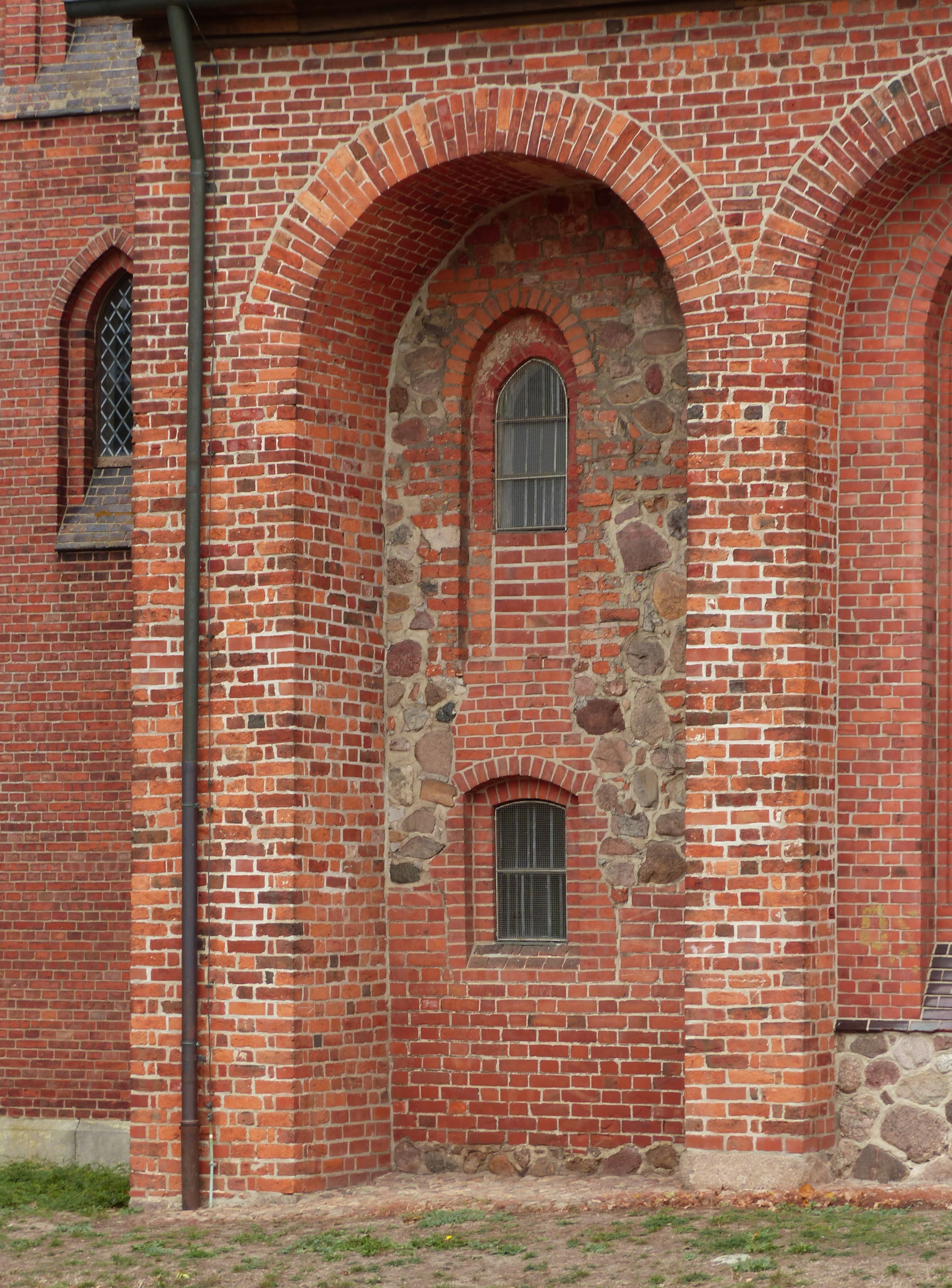 Mauritiuskirche in Altenmedingen, westlichstes Joch der Südseite